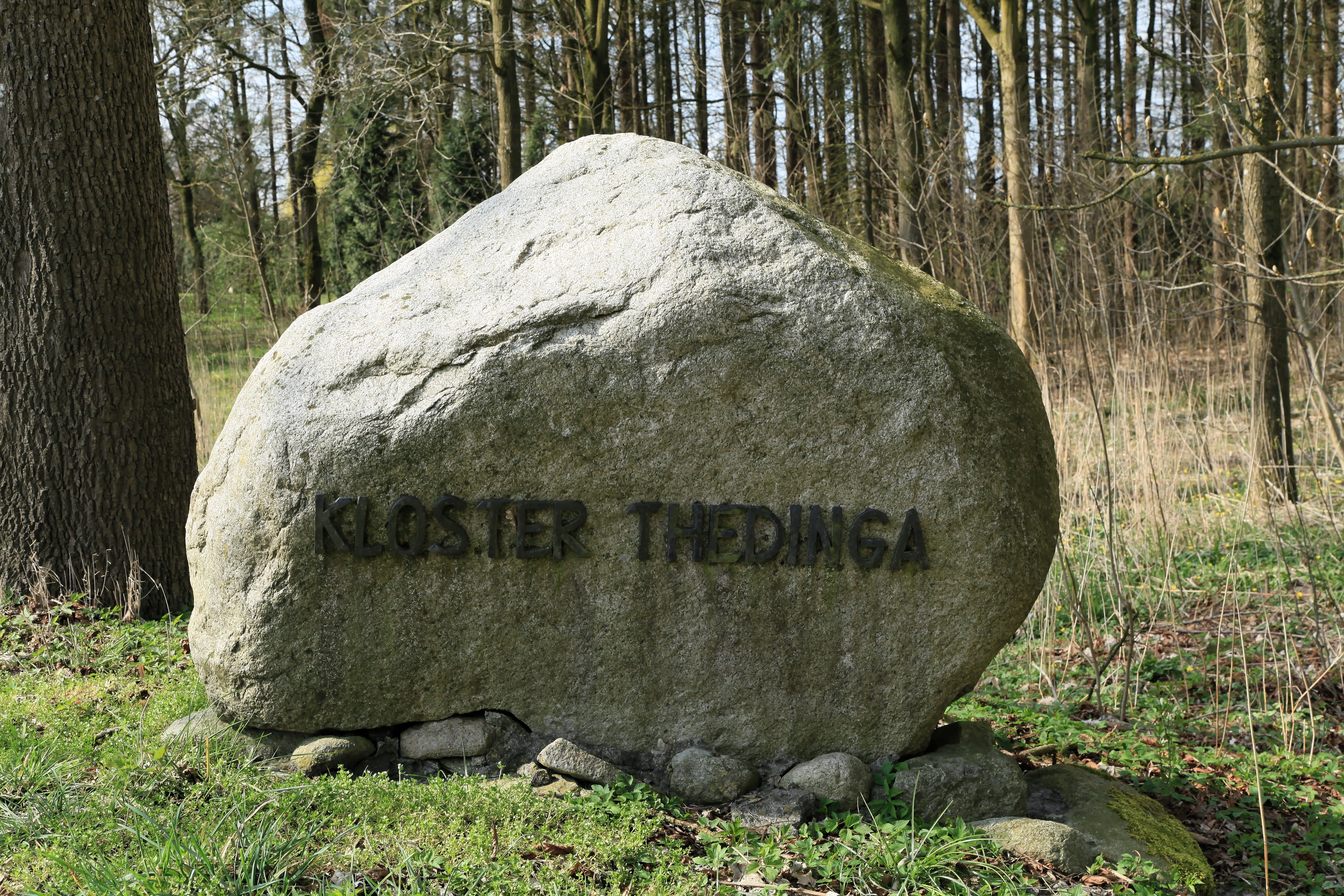 Kloster-Thedinga-Denkmal, Kloster-Thedinga-Straße in Leer (Ostfriesland)